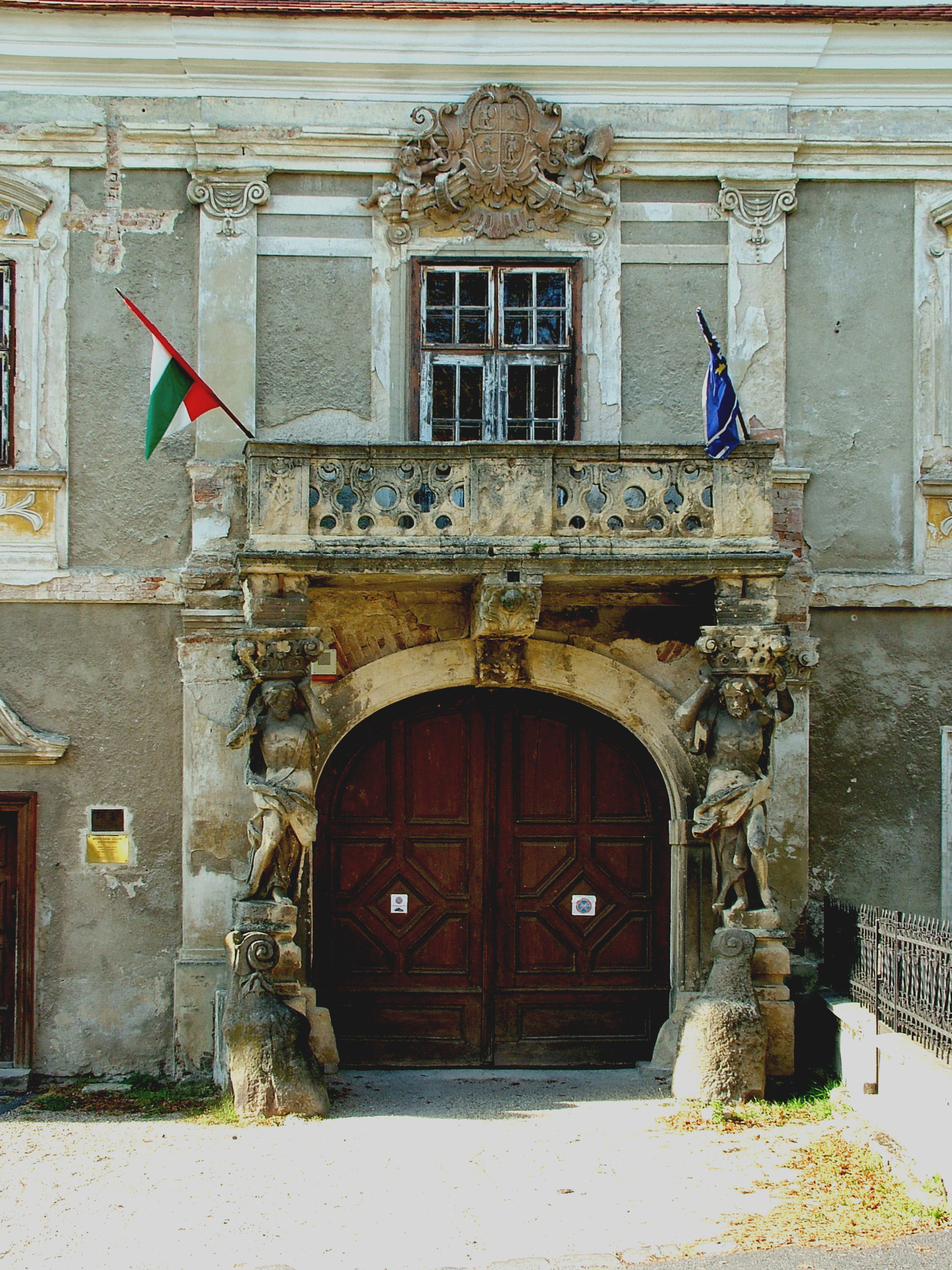 Sümegi püspöki palota